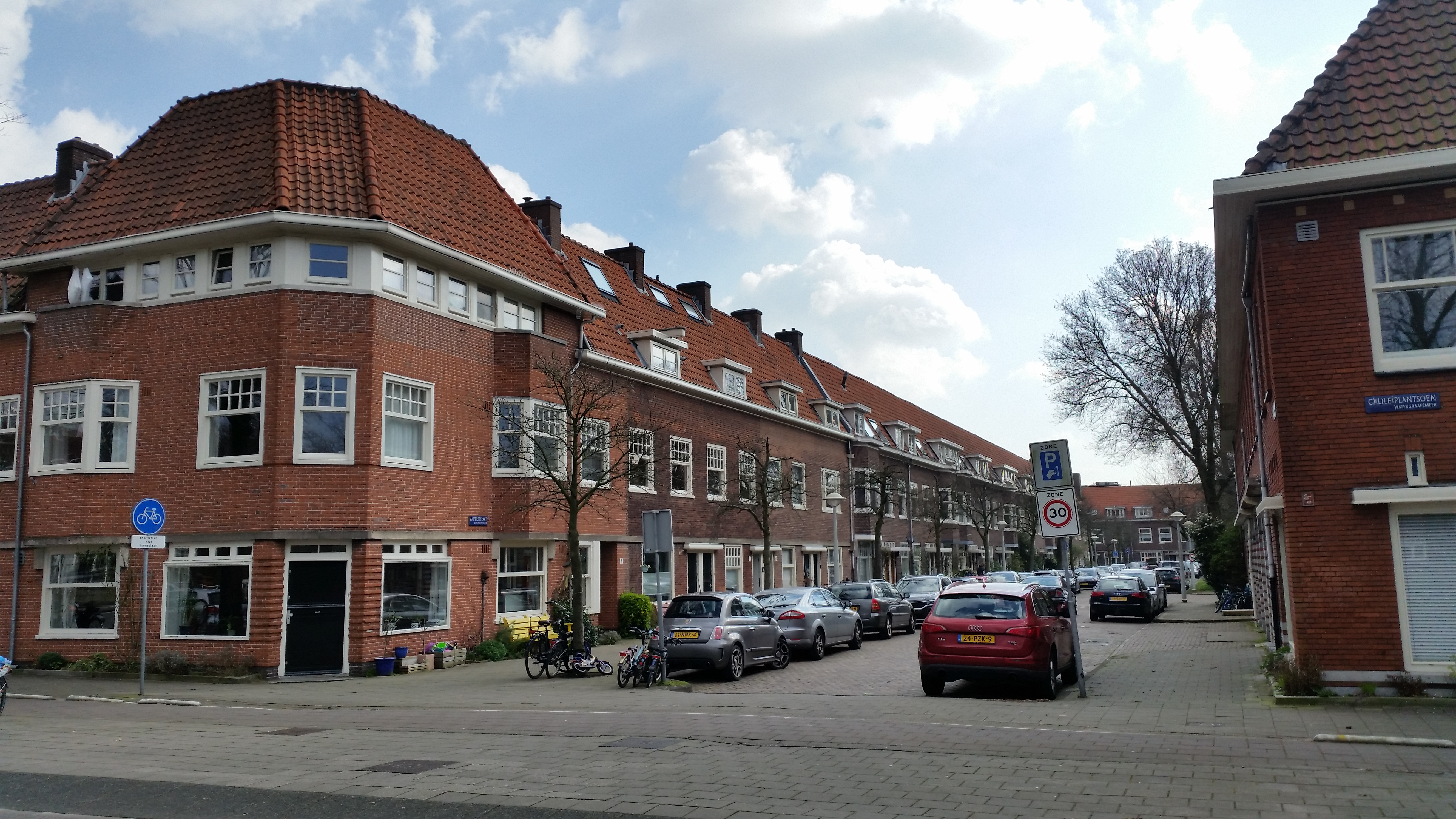 Impressie van de Ampèrestraat, Amsterdam (maart 2020)